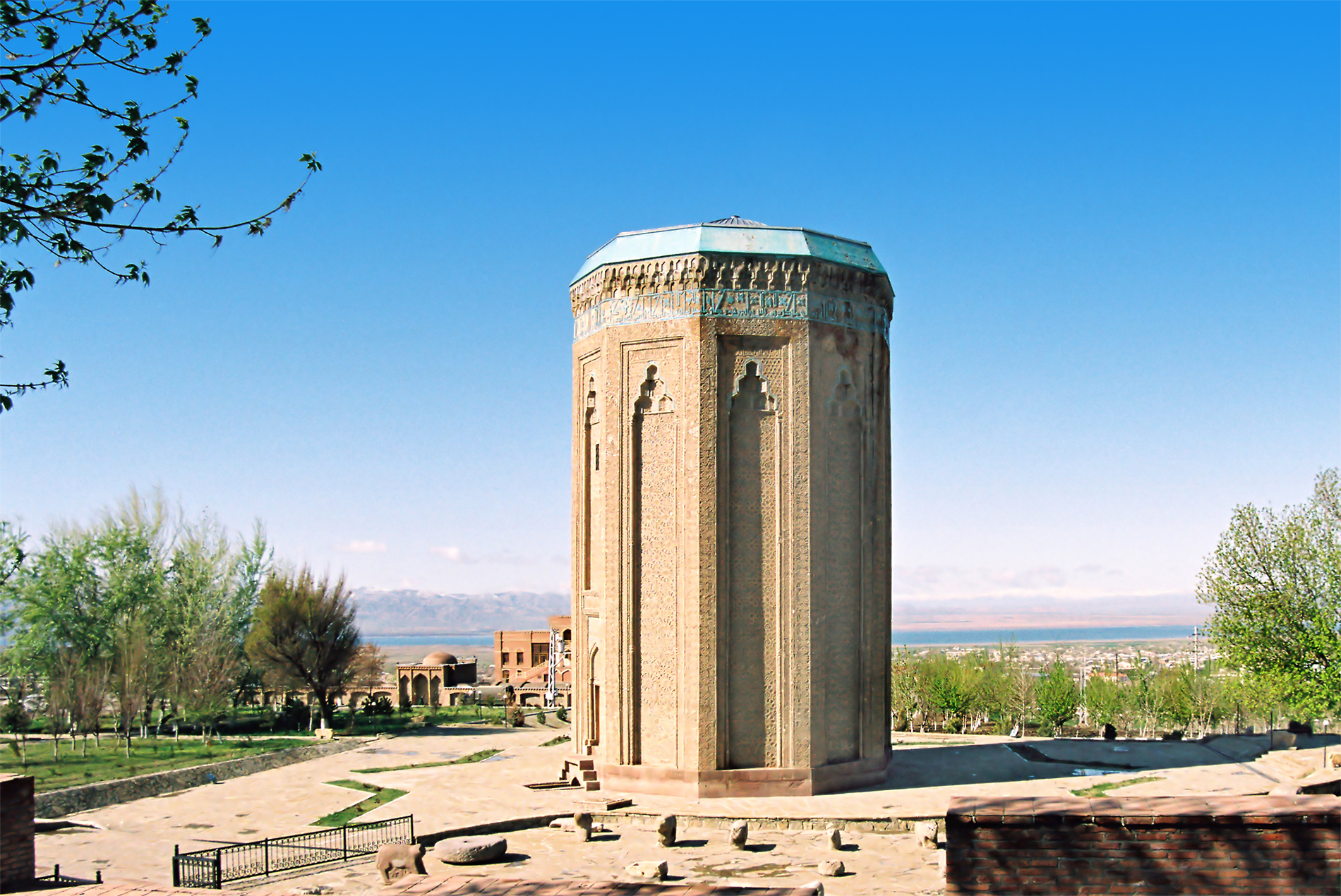 Momine Hatun Mausoleum in Nakhichevan